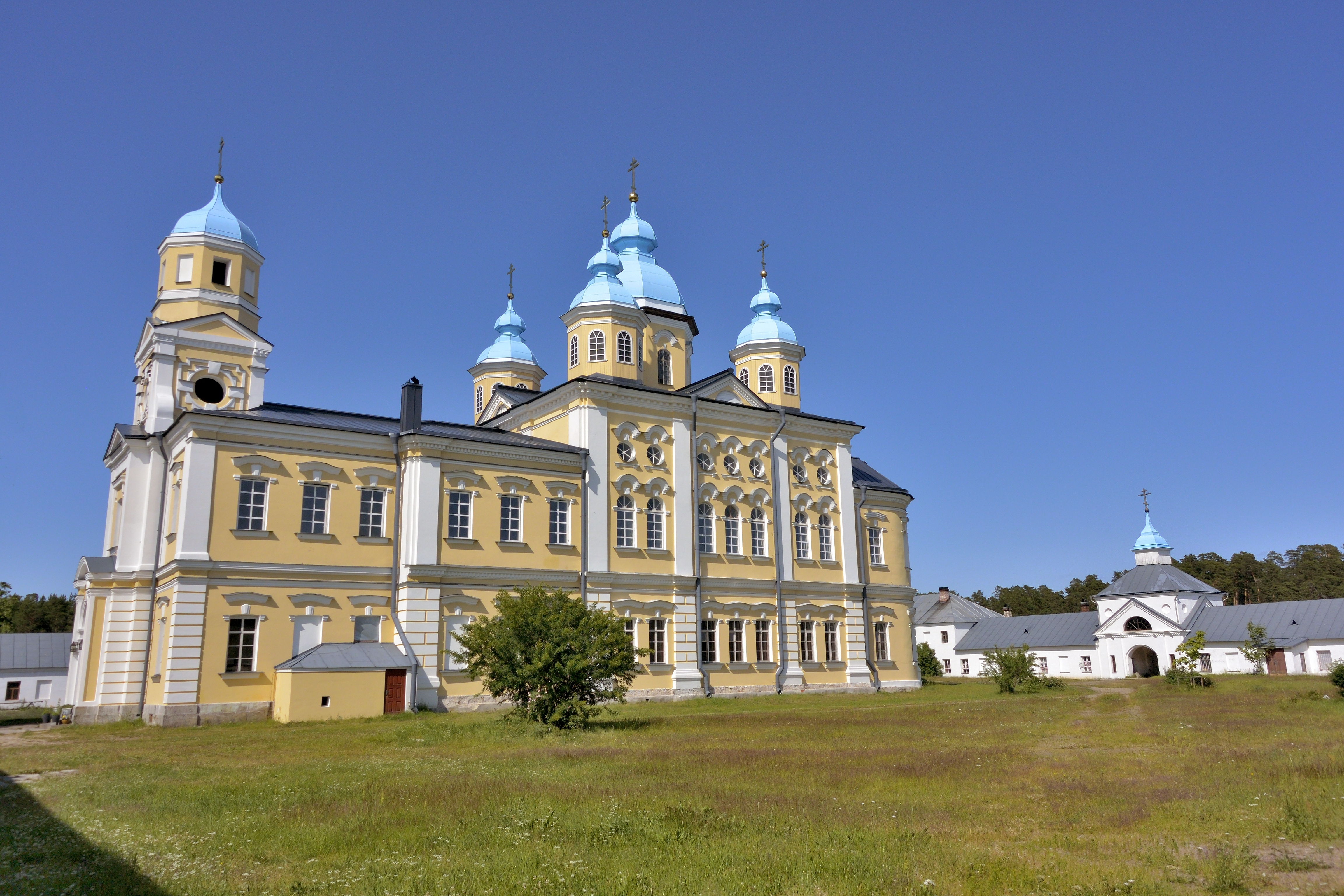 Собор Рождества Пресвятой Богородицы: о. Коневец, Приозерский район, Ленинградская область